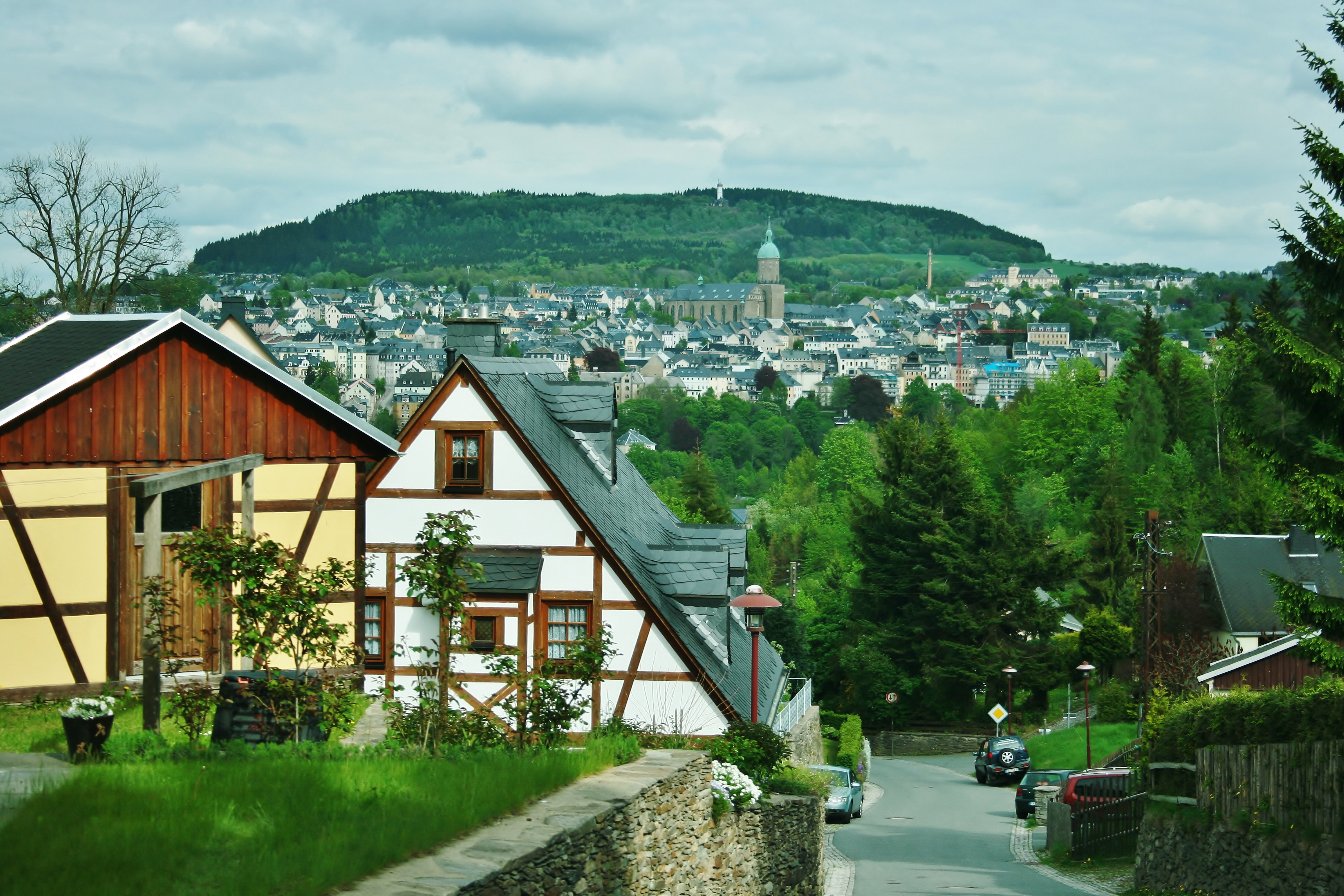 Blick von Frohnau aus nach Annaberg-Buchholz, weithin sichtbar die Sankt Annenkirche